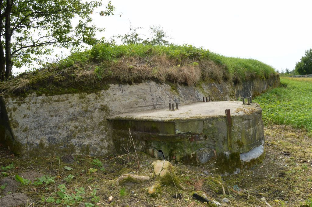 Observationsbunker fra Sikringsstilling Nord på Store Borgbjerg